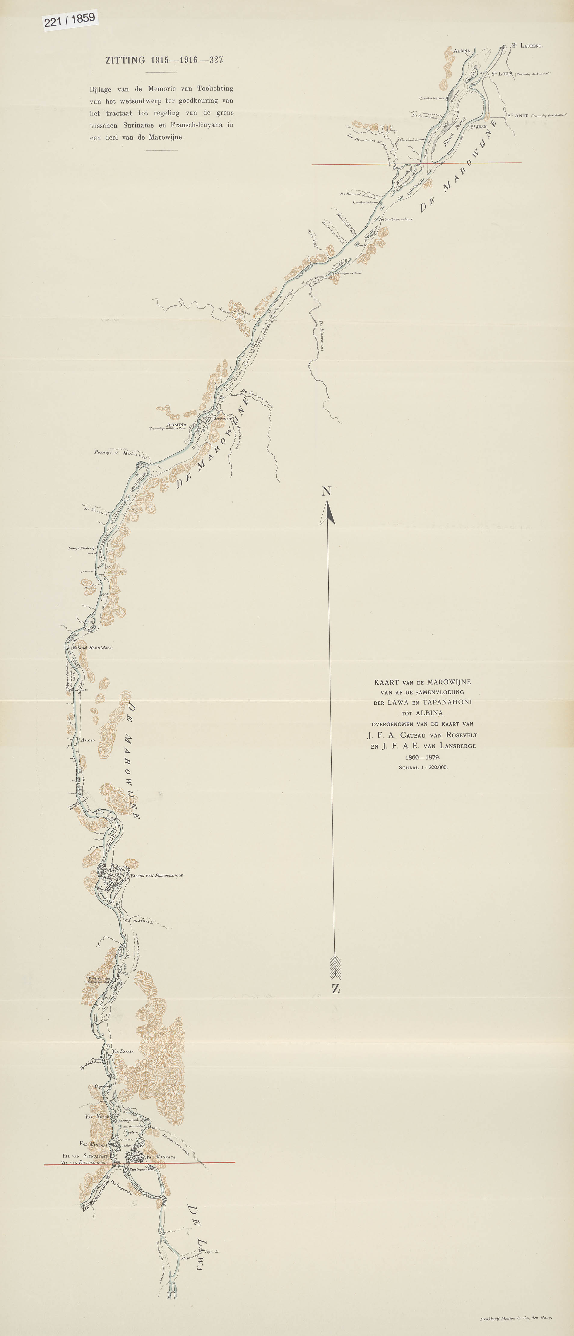 Op de kaart is tevens aangegeven tot waar de rivier bevaarbaar is voor kleine stoomvaartuigen en zijn de diverse vervalpunten aangeduid. Bijlage van de Memorie van Toelichting van het wetsontwerp ter goedkeuring van het tractaat tot regeling van de grens tusschen Suriname en Fransch-Guyana in een deel van de Marowijne